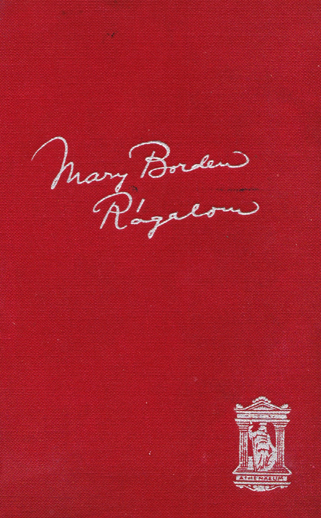 Mary Borden Rágalom (1930-as évek), a borítódísz szerzője nem ismert